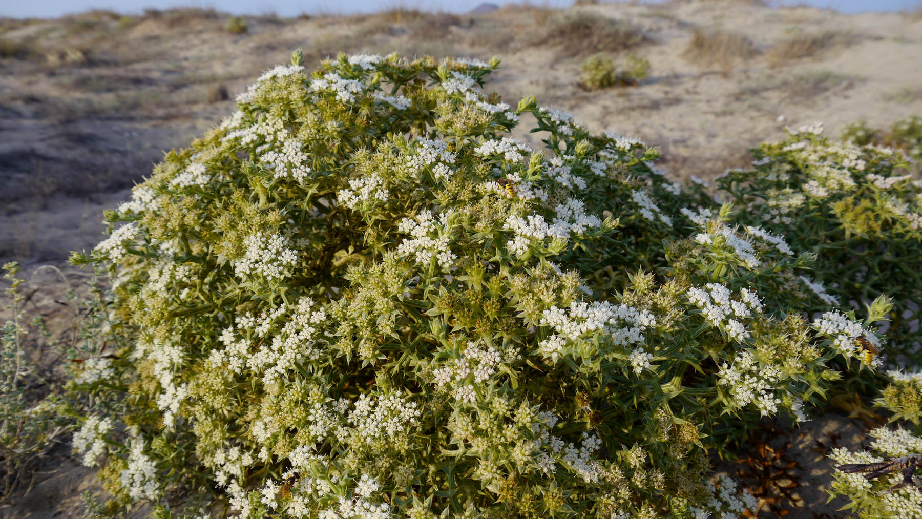 Zahanoria marítima (Echinophora spinosa) en La Manga del Mar Menor (España).